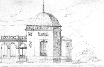 Tiškevičiai Palace chapel in Palanga design.